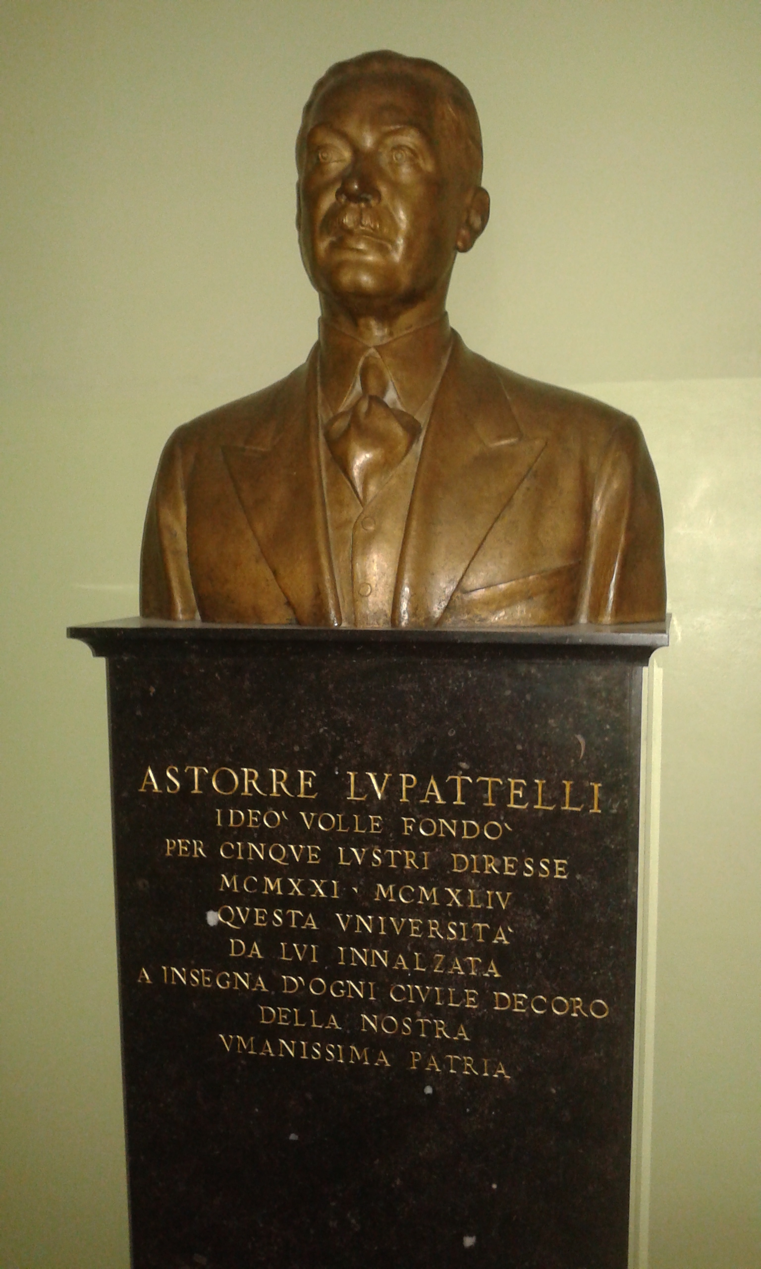 Busto di Astorre Lupattelli, Università per Stranieri di Perugia